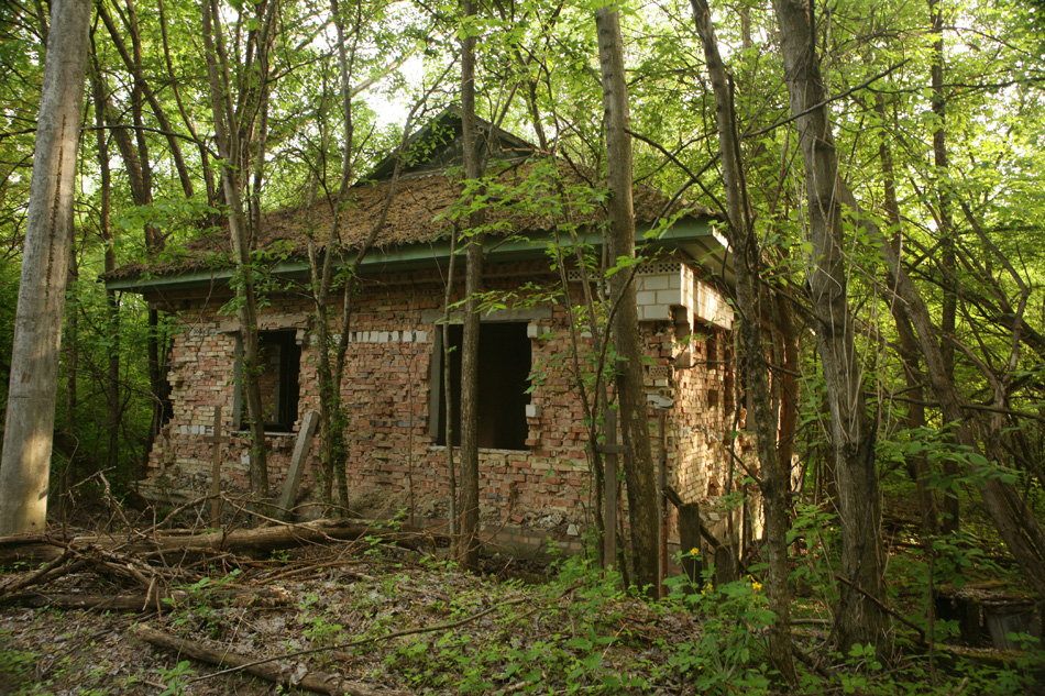 Дом в г. Чернобыле по пер. Киевскому